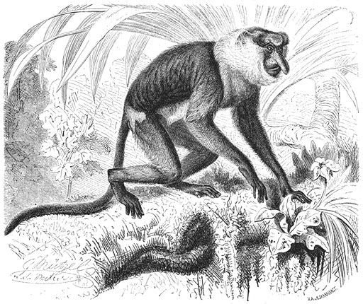 Neusaap of Kahau (Nasalis larvatus)